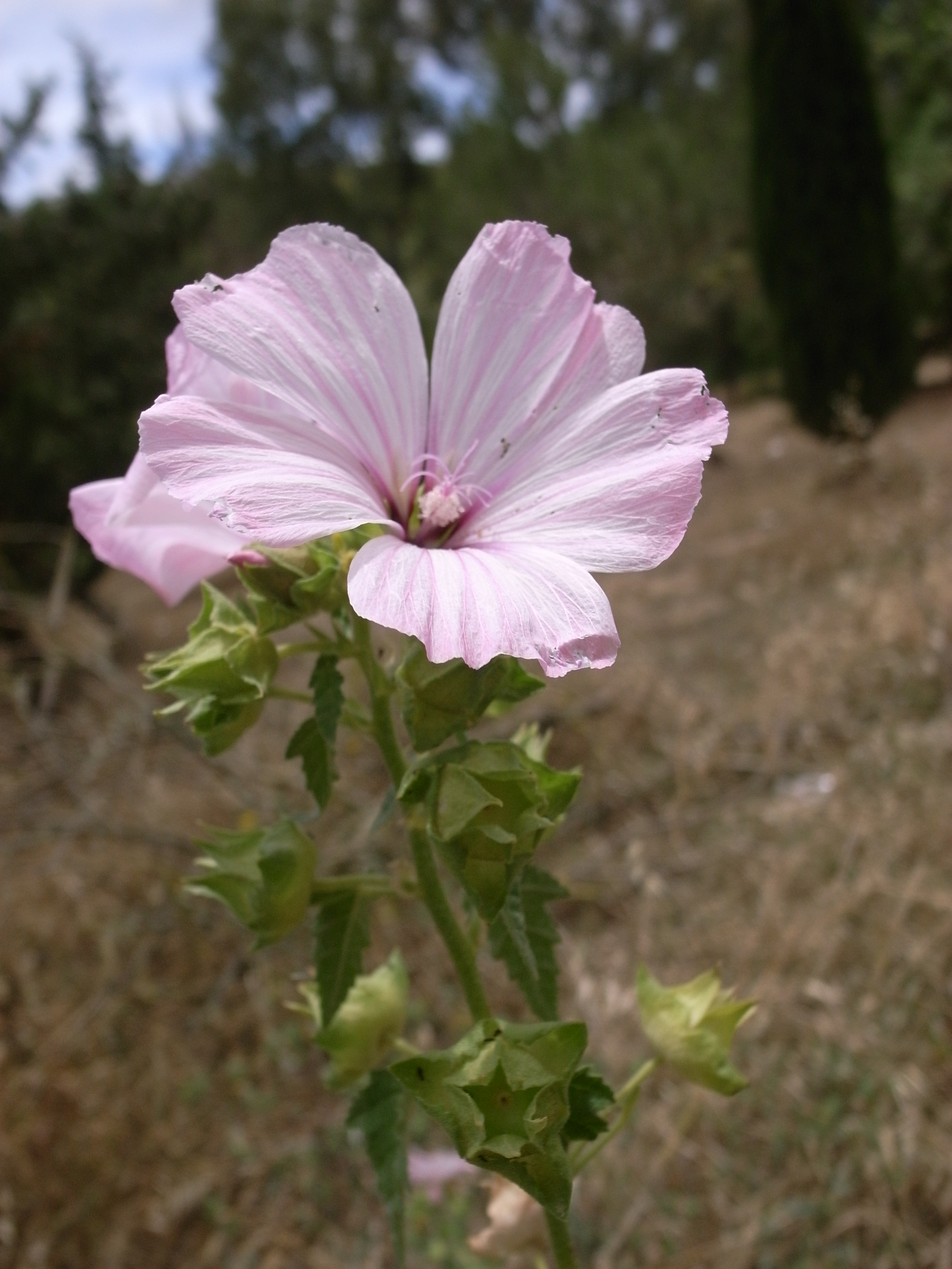 Lavatera trimestris, Buskett Gardens, Malta